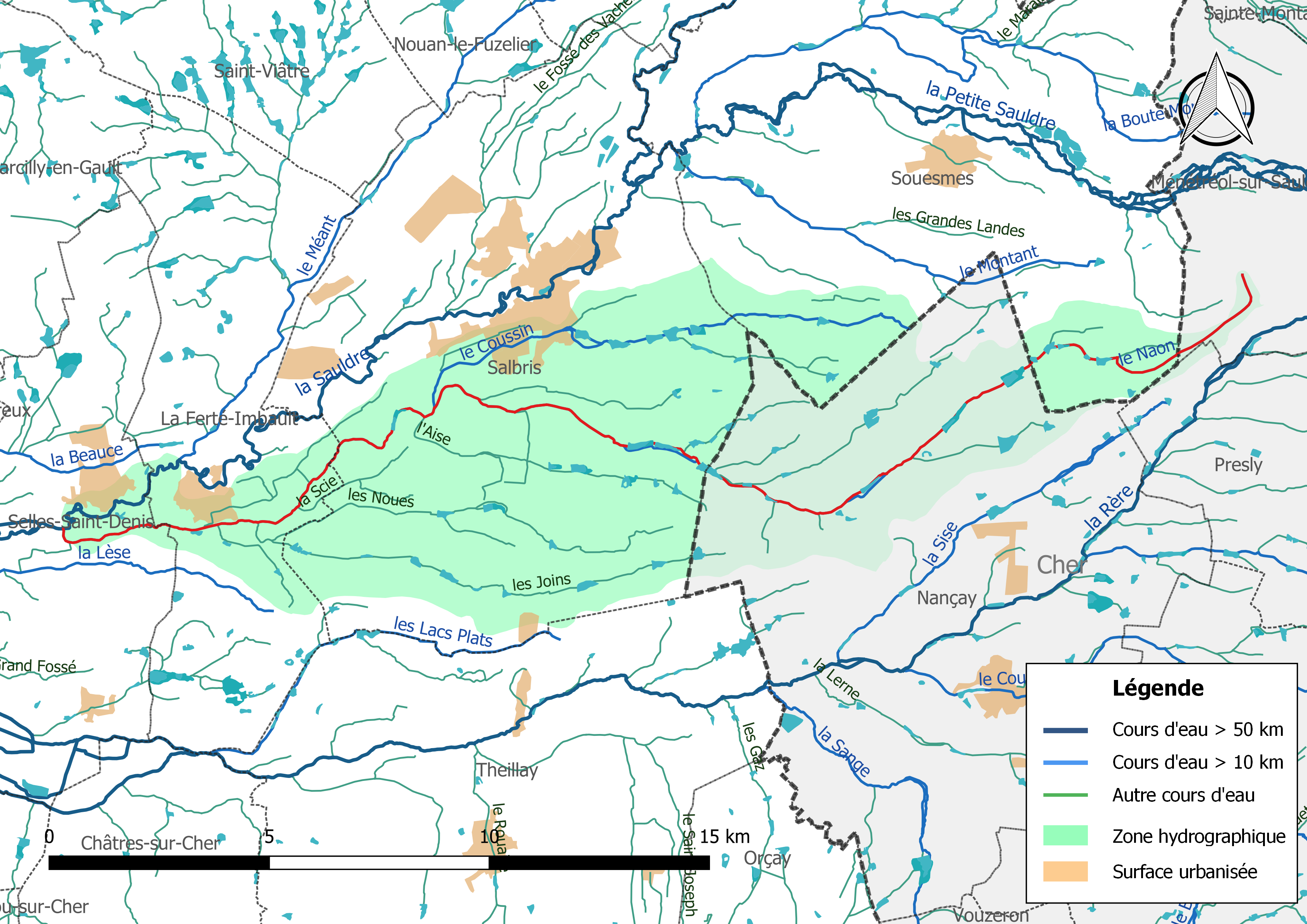 Carte du cours d'eau « le Naon » et de son bassin versant (zone hydrographique dans laquelle il s'insère).